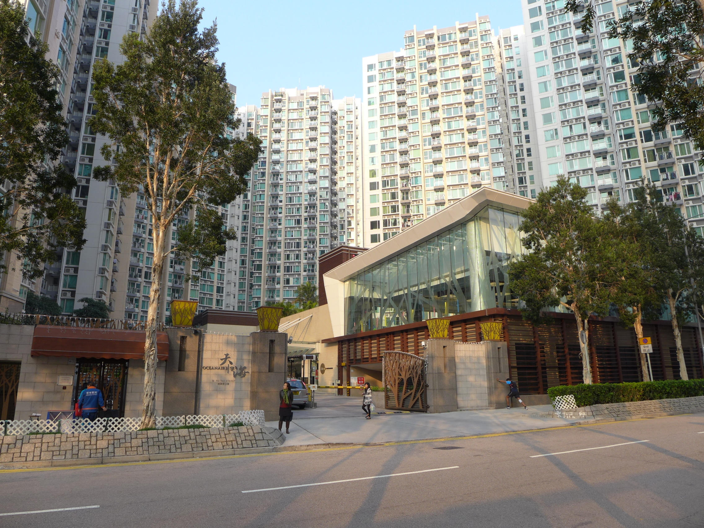 Oceanaire Entrance